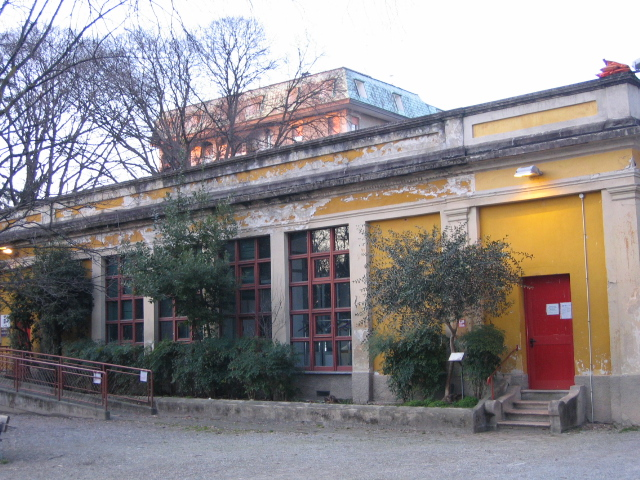 Edificio intitolato al pittore Filippo De Pisis che, nel periodo di degenza presso la struttura psichiatrica "Villa Fiorita", si ritirava qui a dipingere i suoi quadri